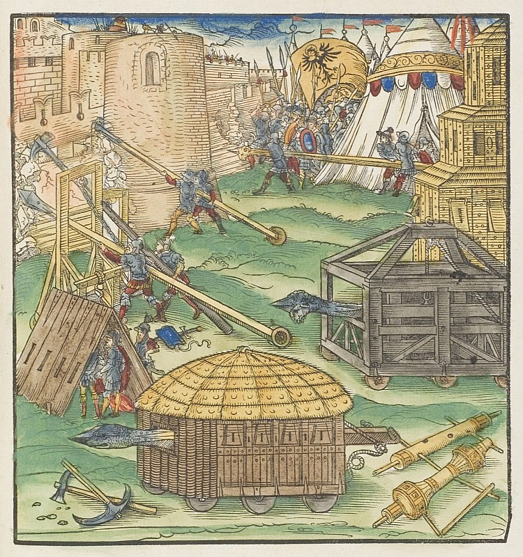 Original image description from the Deutsche Fotothek Belagerung & Festung & Belagerungsmaschine